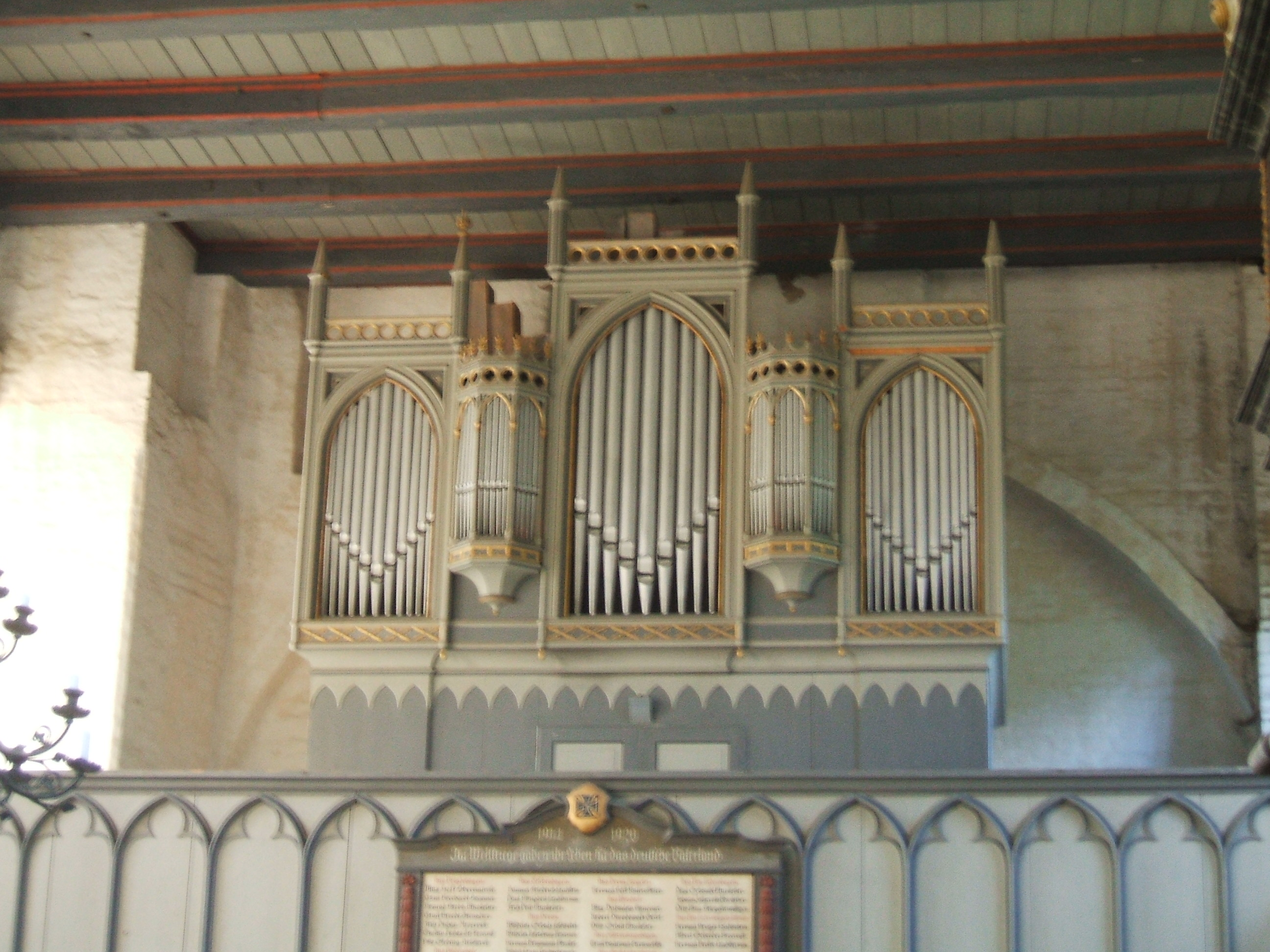 Voigdehagen, Dorfkirche, Orgel von C. A. Buchholz 1845 (2007-09-xx)